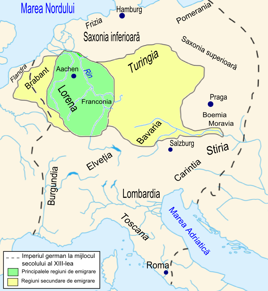 Regiunile de provenienţă ale coloniştilor saşi în Transilvania în secolul al XIII-lea.